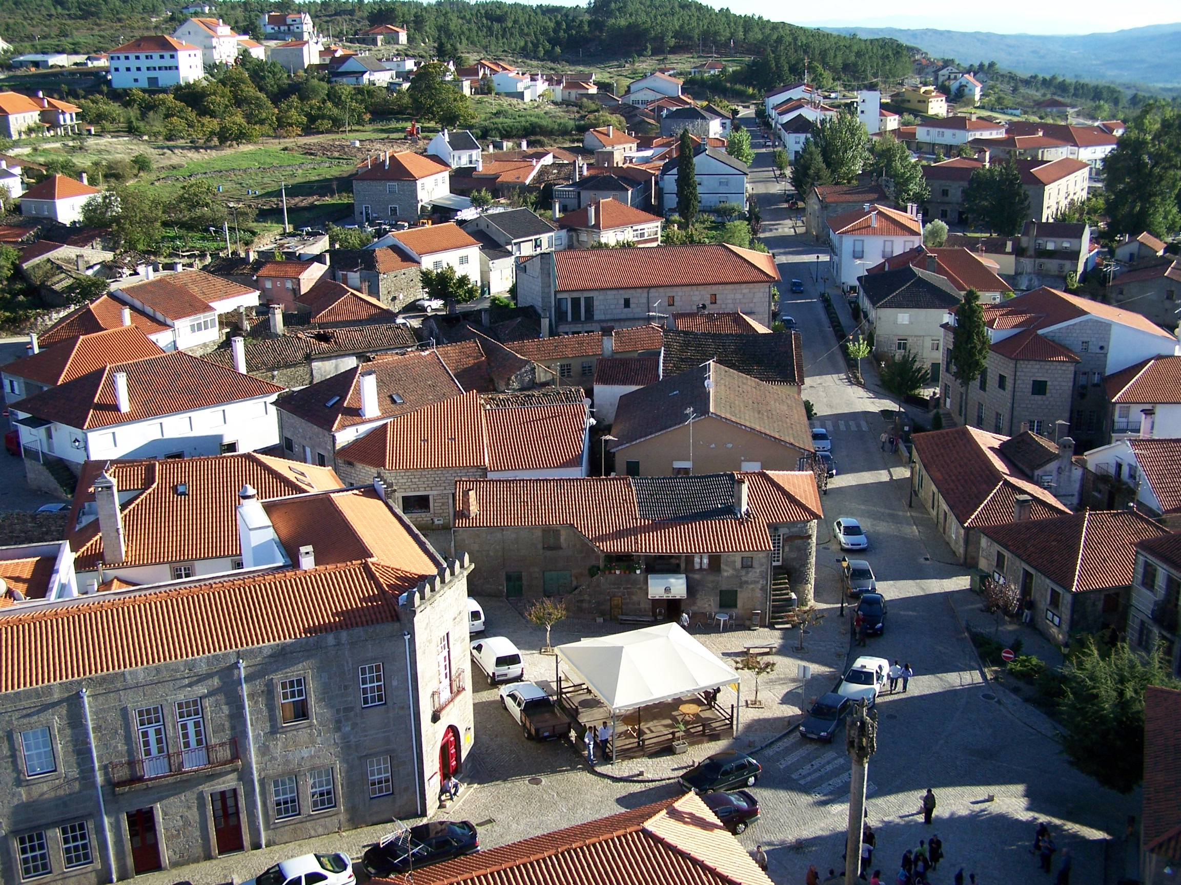 Vista do Castelo de Penedono, Penedono, Portugal